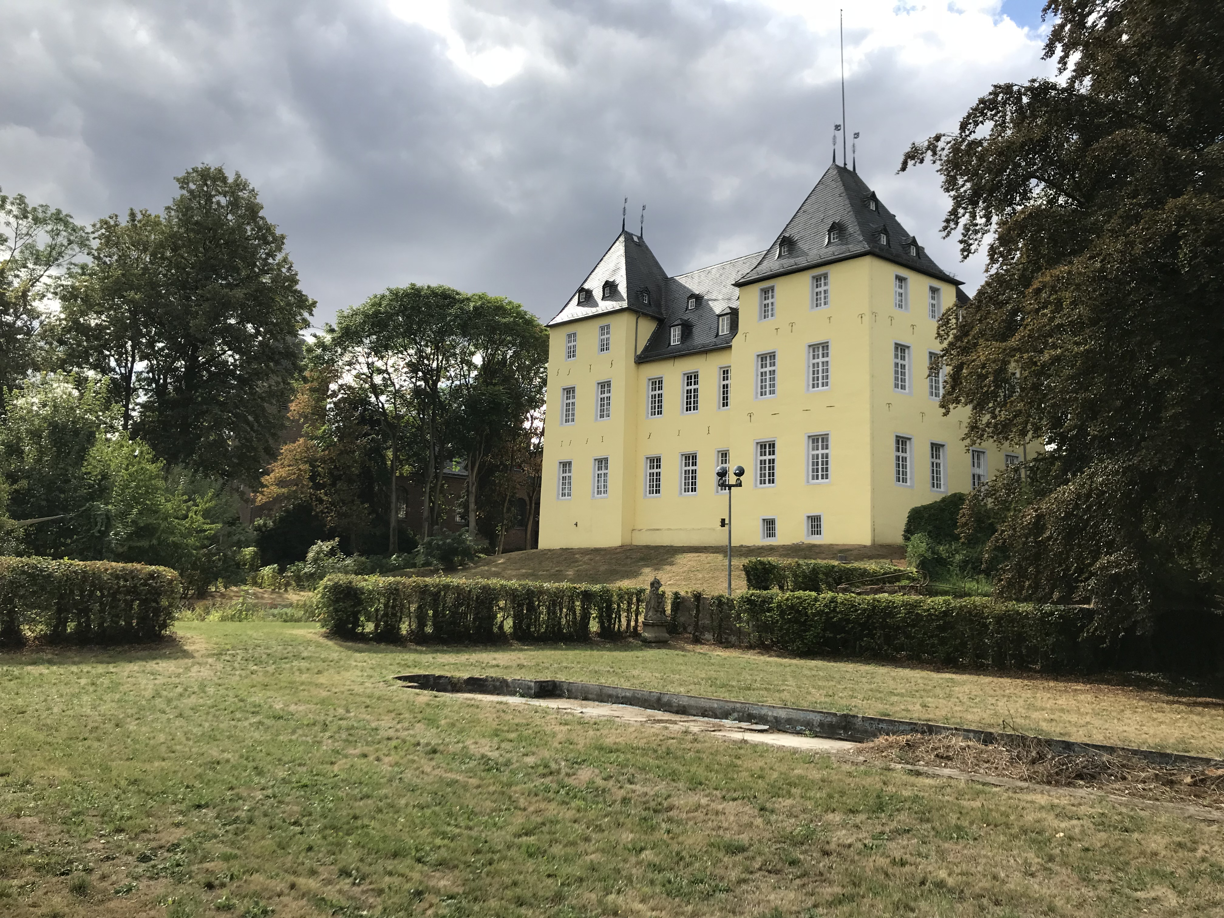 Schloss Alfter mit Schlossgarten